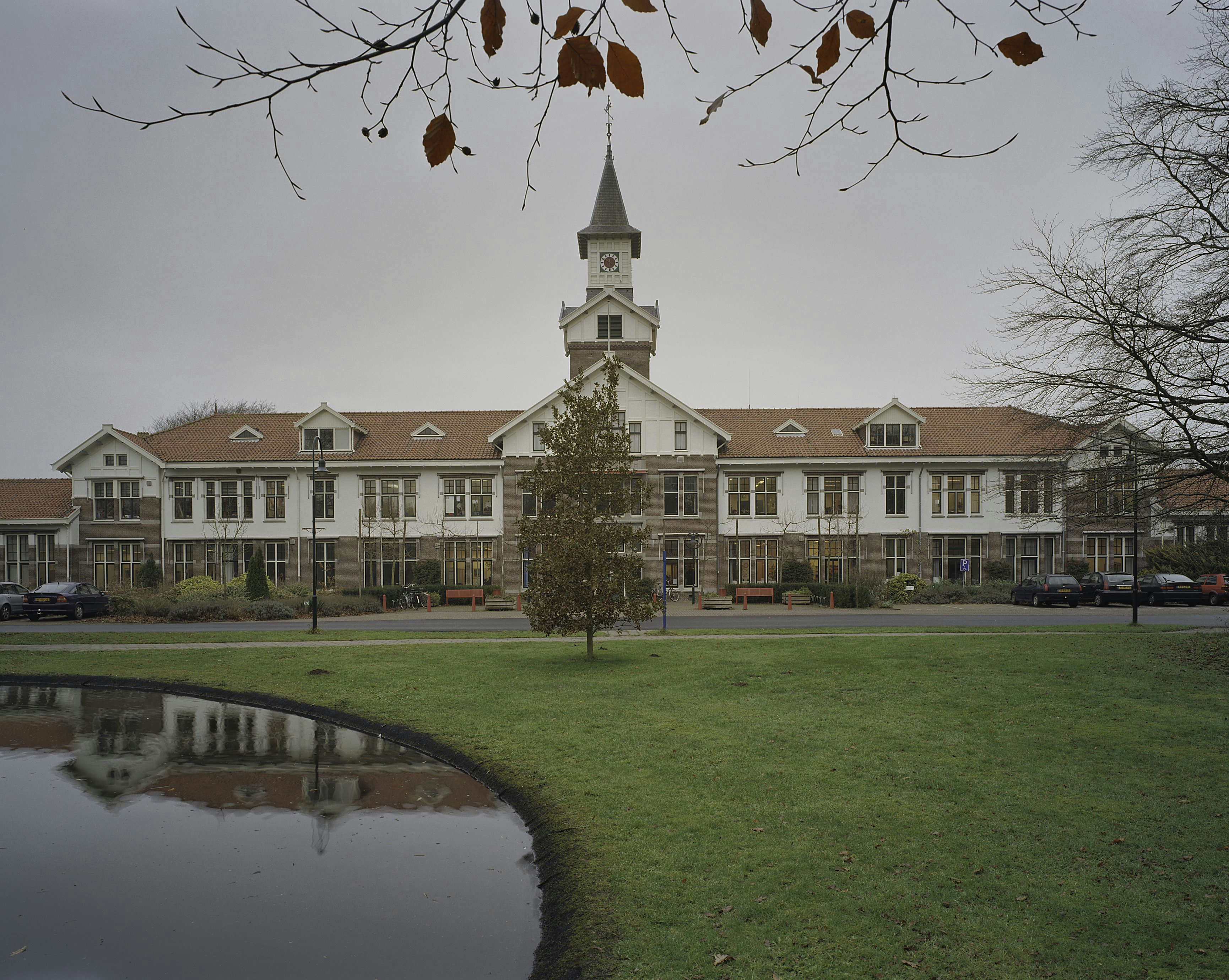 Psychiatrische inrichting Duin en Bosch: Hoofdgebouw, overzicht voorgevel (opmerking: Gefotografeerd voor Monumenten In Nederland Noord-Holland) This is a possible Rijksmonument: Find the monument in the Monuments database: Duinenboschweg 3 in Bakkum All Rijksmonumenten in Bakkum Is this a Rijksmonument? Yes No More information about this project and help. More images to work at in Category:Possible Rijksmonumenten.